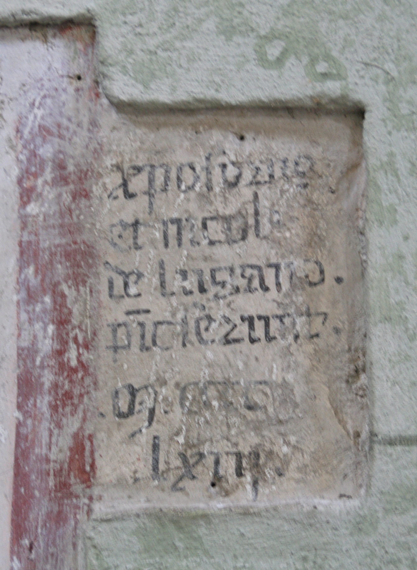 Kirche Santi Lorenzo e Agata : Inschrift der Maler Seregno